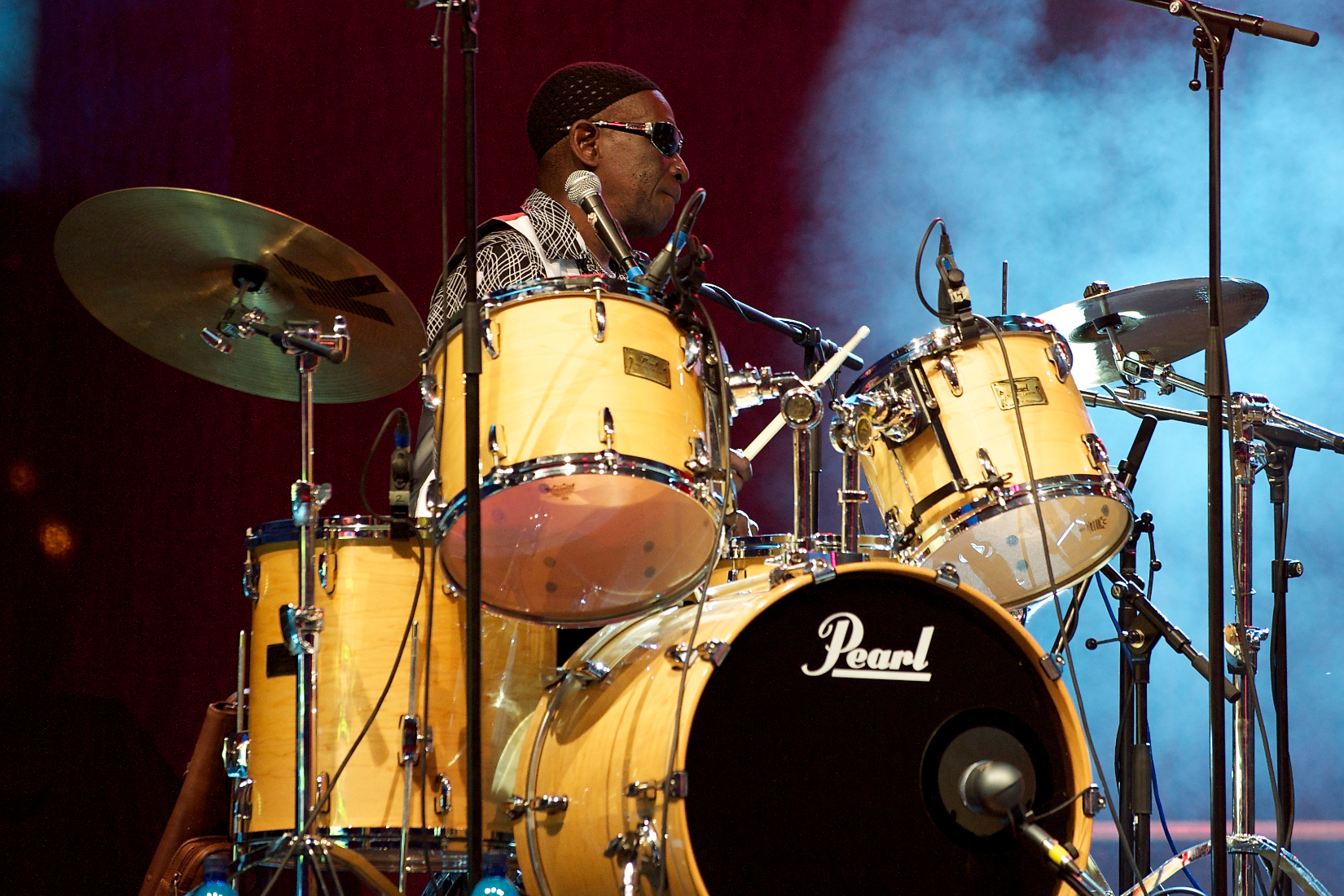 Tony Allen beim Würzburger Hafensommer am 04.08.2010